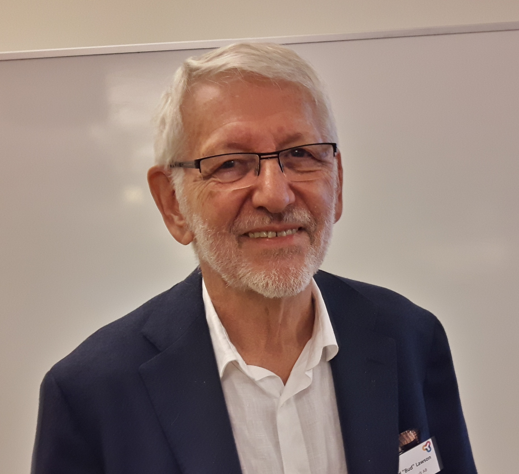 Harold Lawson giving a presentation in Linköping in 2017.